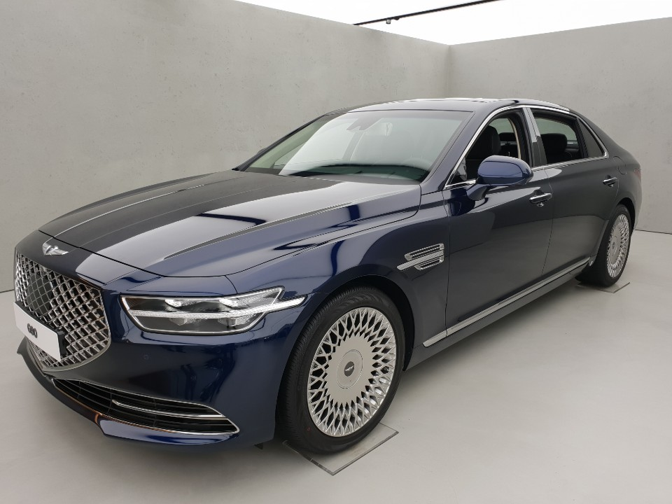 제네시스 G90 정측면